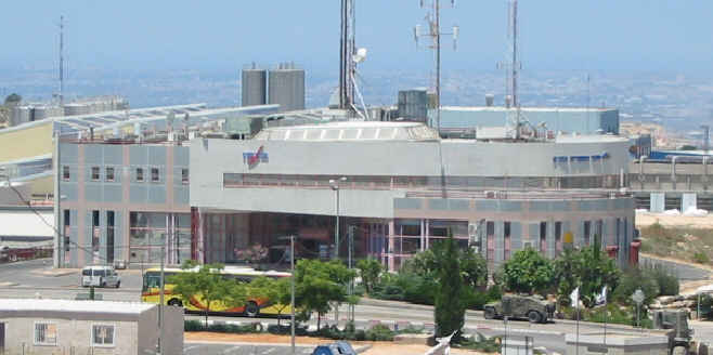 Barkan mall